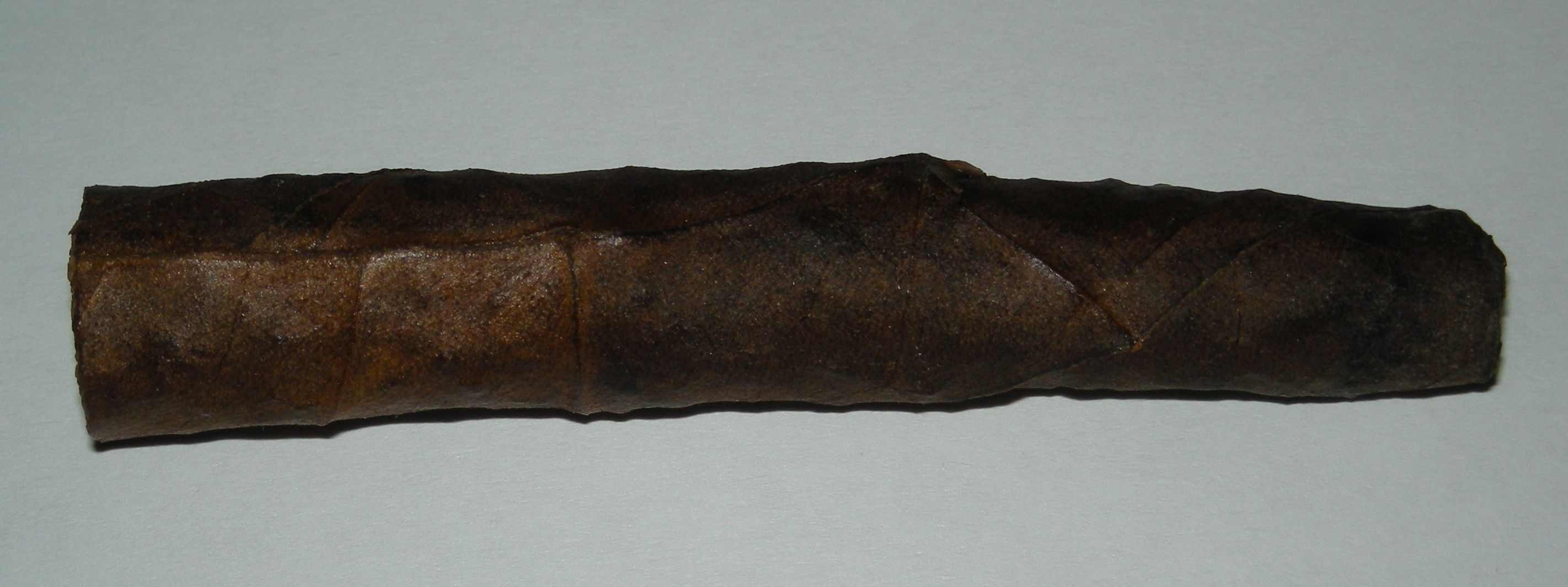 Toscanello (halved tuscan cigar)